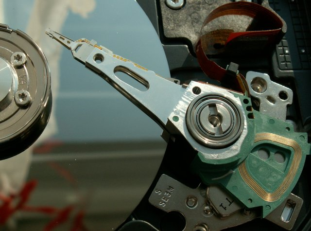 Detail vystavovací mechaniky harddisku, lineární motor